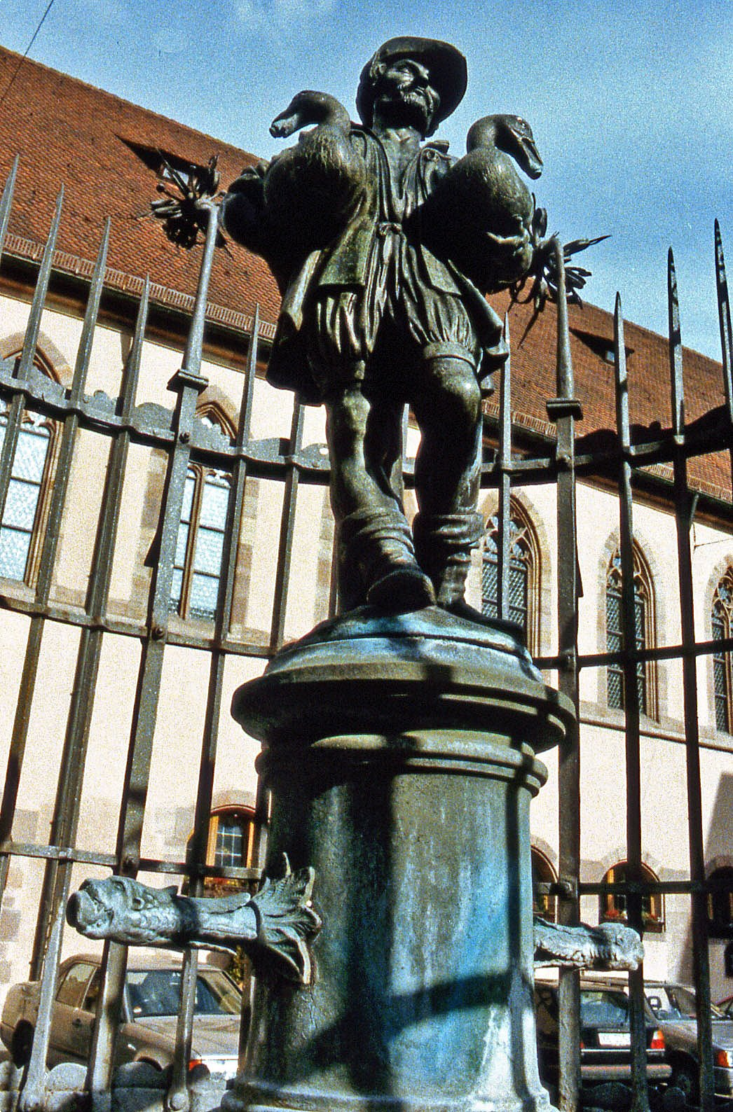 Nuremberg, fountain „Das Gänsemännlein“. Der zum Obstmarkt gehörende Bronze-Brunnen im Stil des Manierismus, das Gänsemännlein, stammt von einem unbekannten Meister und wurde von Labenwolf (1492-1563) in der Zeit um 1550-1560 gegossen. Die Statue zeigt einen lächelnden Gänsehirten mit zwei wasserspeienden Prachtexemplaren seines Geflügels.